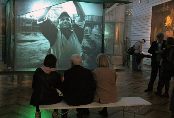 L'exposition permanente de la Cité nationale de l'histoire de l'immigration